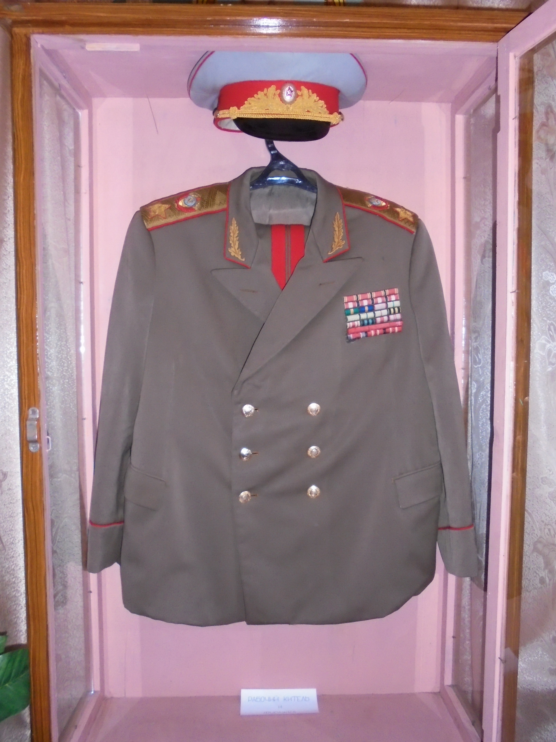 Рабочий китель и фуражка Маршала Н. И. Крылова (часть постоянной экспозиции Историко-краеведческого музея имени Н. И. Крылова в селе Вишнёвое Тамалинского р-на Пензенской области)